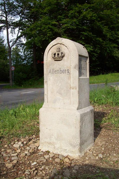 Kgl.-sächs. Postmeilenstein, Abzweigstein Neurehefeld